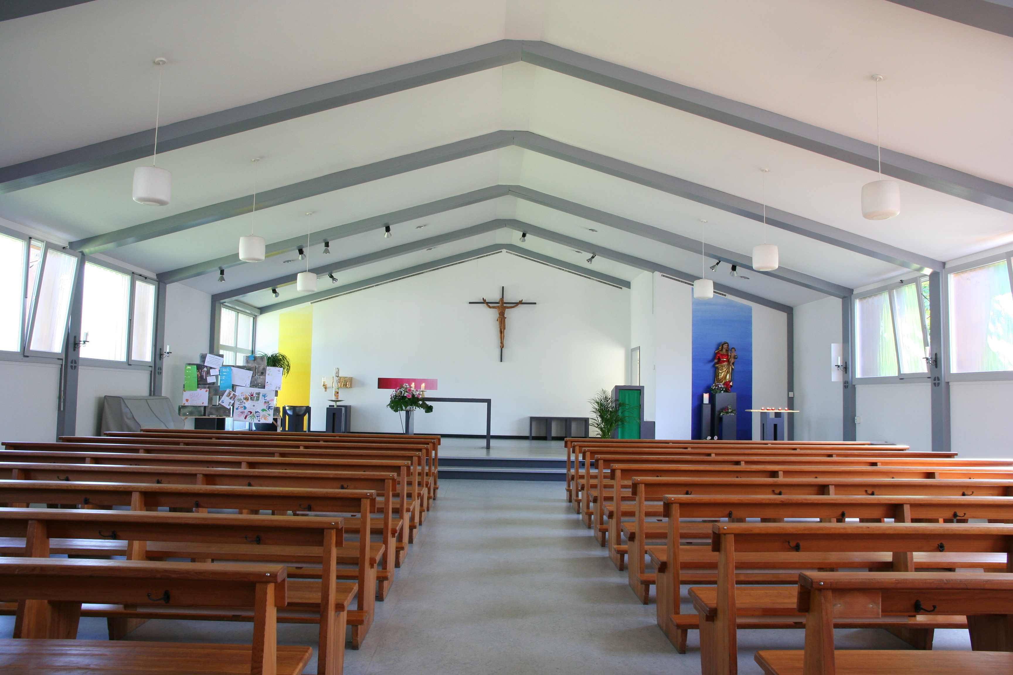 Römisch-katholische Kirche St. Antonius Obfelden, Innenansicht